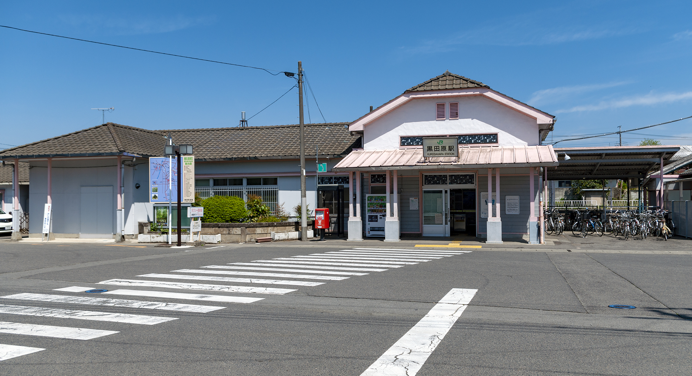 東日本旅客鉄道株式会社東北本線黒田原駅駅全景